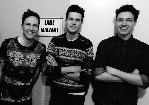 Členové kapely Lake Malawi